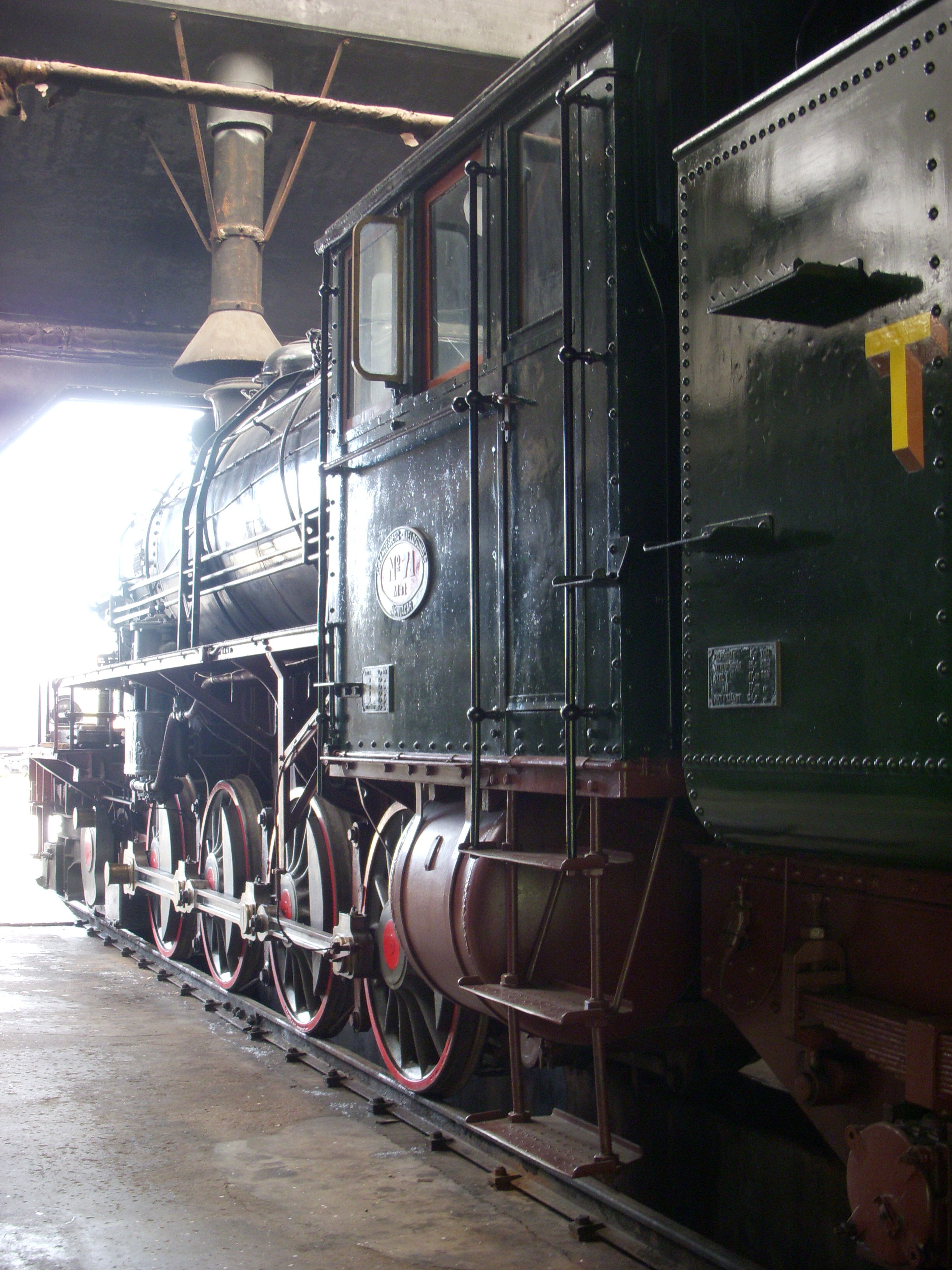 Lokmuseet i Grängesberg, Ludvika kommun, ångturbinlok M3t nr 71